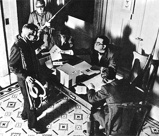 Fraude electoral, Buenos Aires 1935